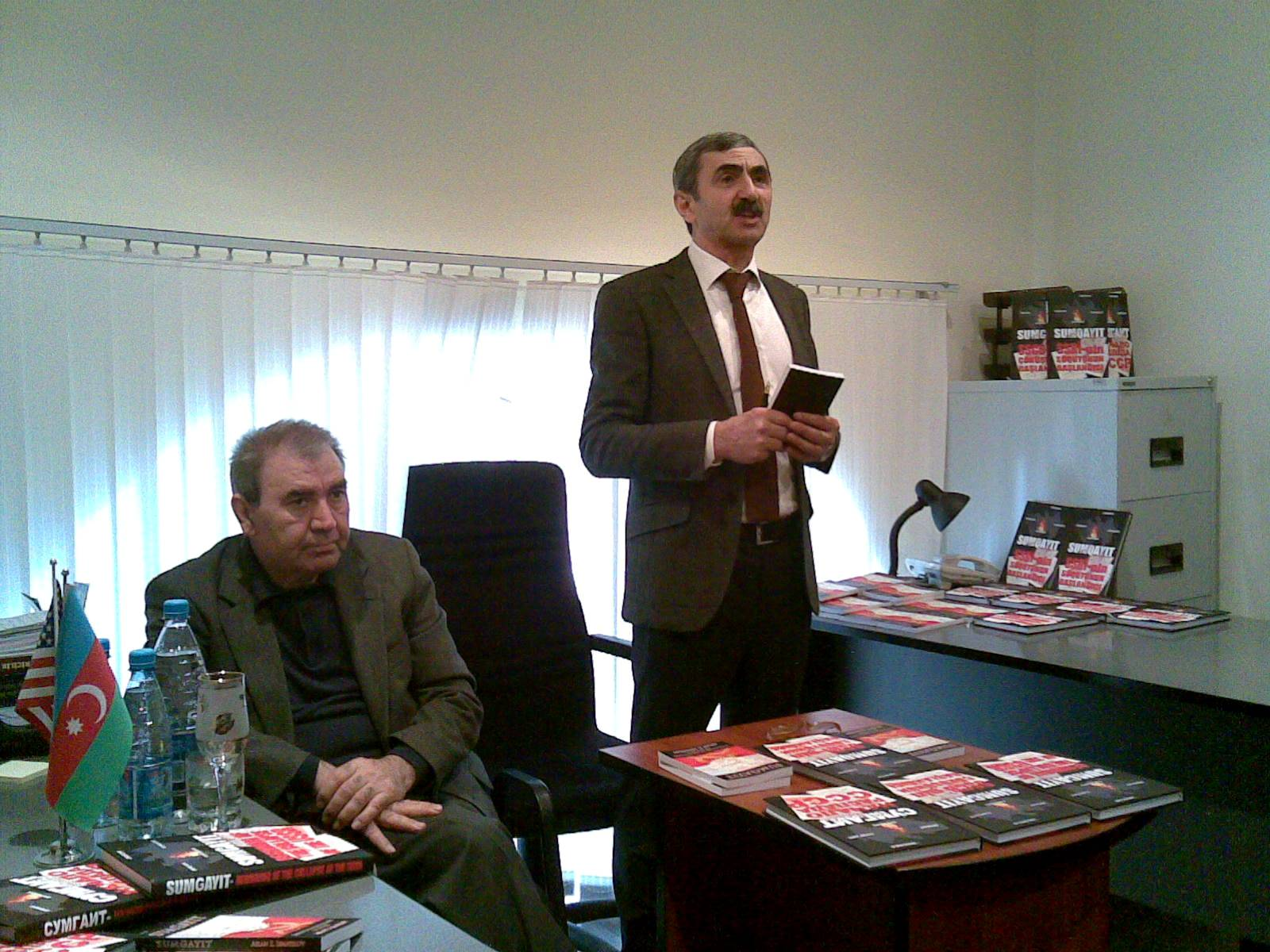 Aslan İsmayılov və Cəmil Həsənli. Sumqayıt hadisələri haqqında kitabın yeni nəşrinin təqdimatında.